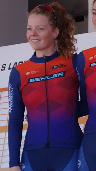 Melanie Klement (Biehler) bij de start van de eerste etappe van Stramproy naar Weert in de Boels Ladies Tour 2019